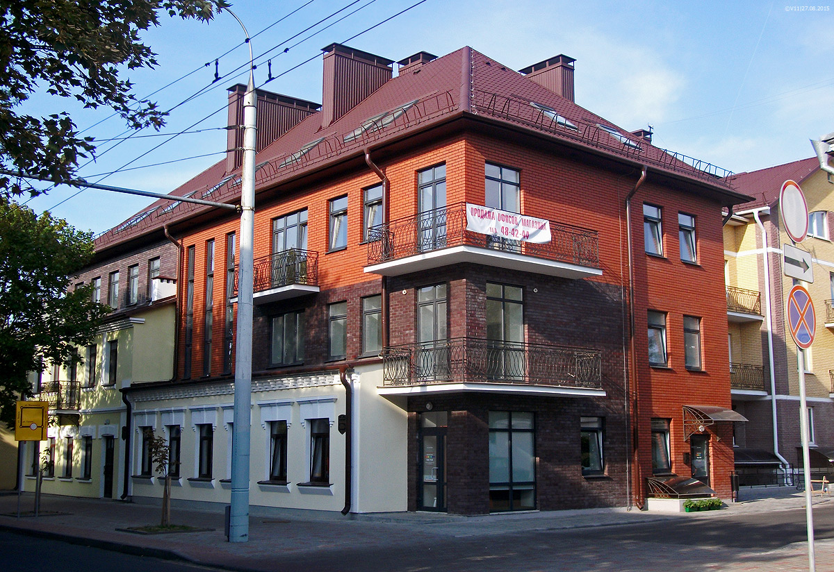 Брэст. Вуліца Карла Маркса, 56